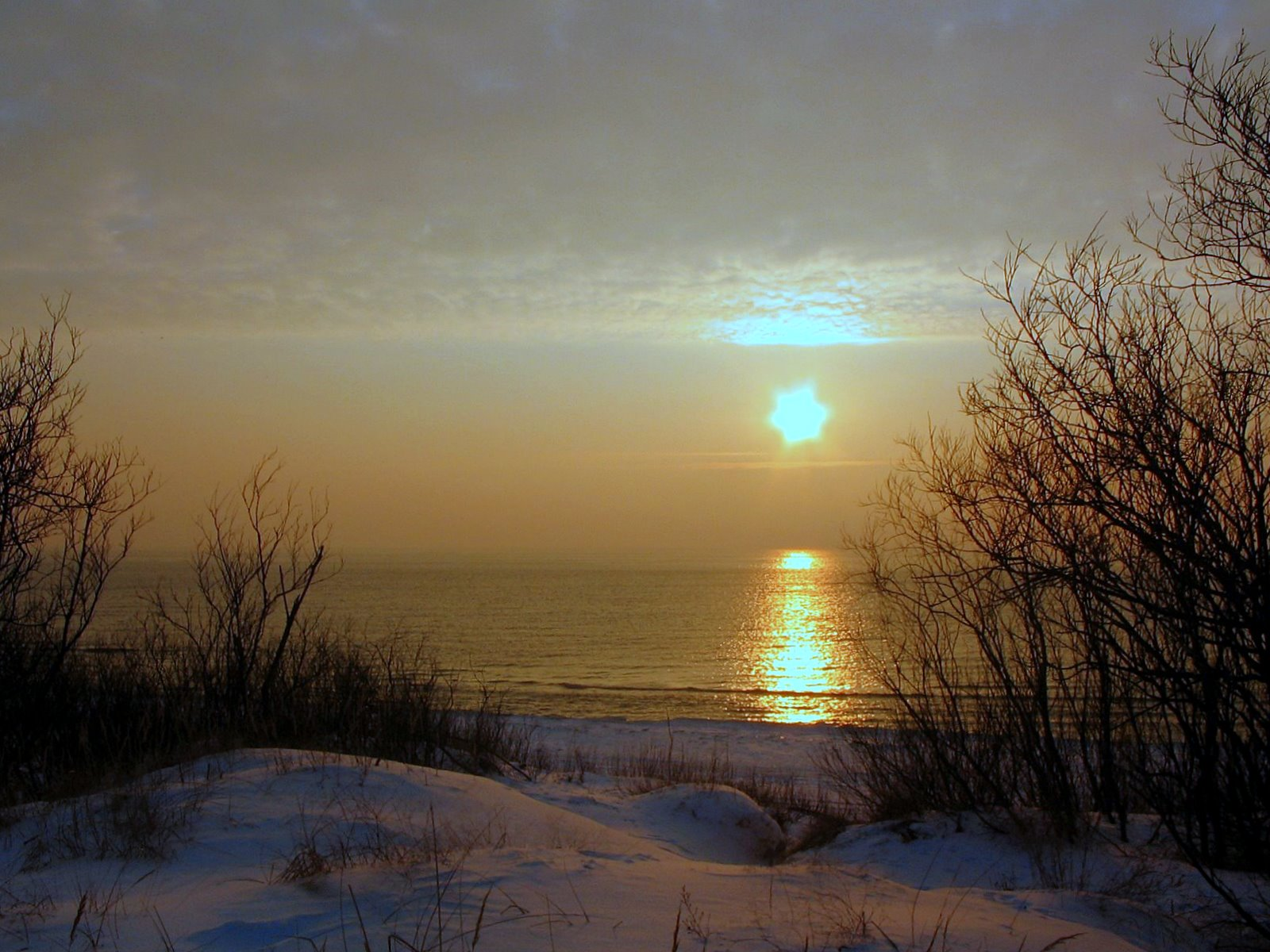 Žiema,vakaras,pajurys,saulė